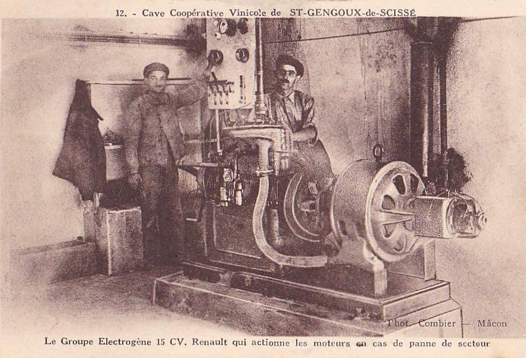 Groupe électrogène cave coopérative vinicole Saint-Gengoux-de-Cissé (Saône-et-Loire), carte postale ancienne